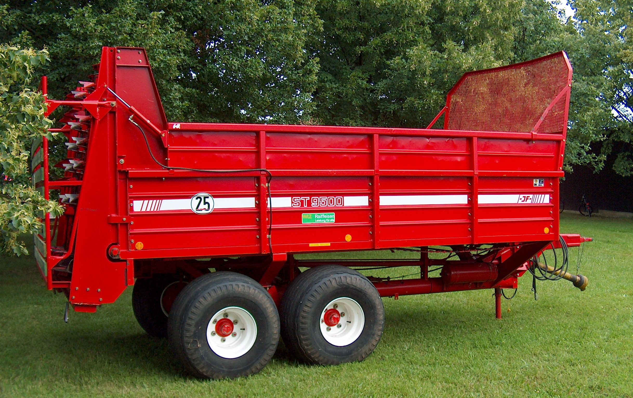 Miststreuer ST9500 der Firma JF